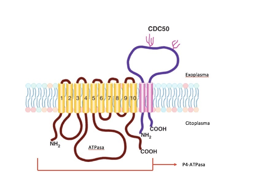 Es desconeix com les P4-ATPases interaccionen amb les proteïnes CDC50.